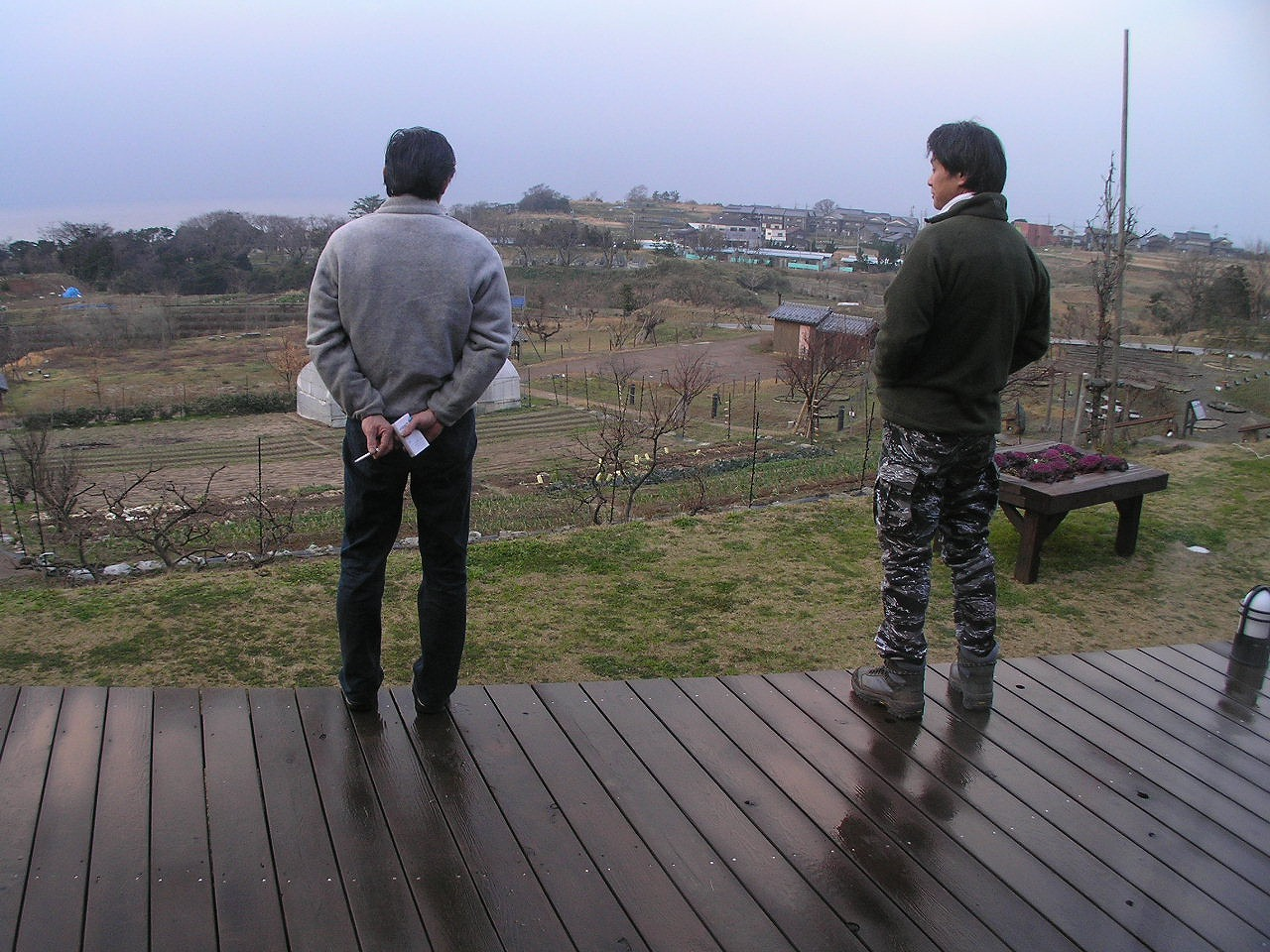 宇川温泉よし野の里館内・海を望むデッキ